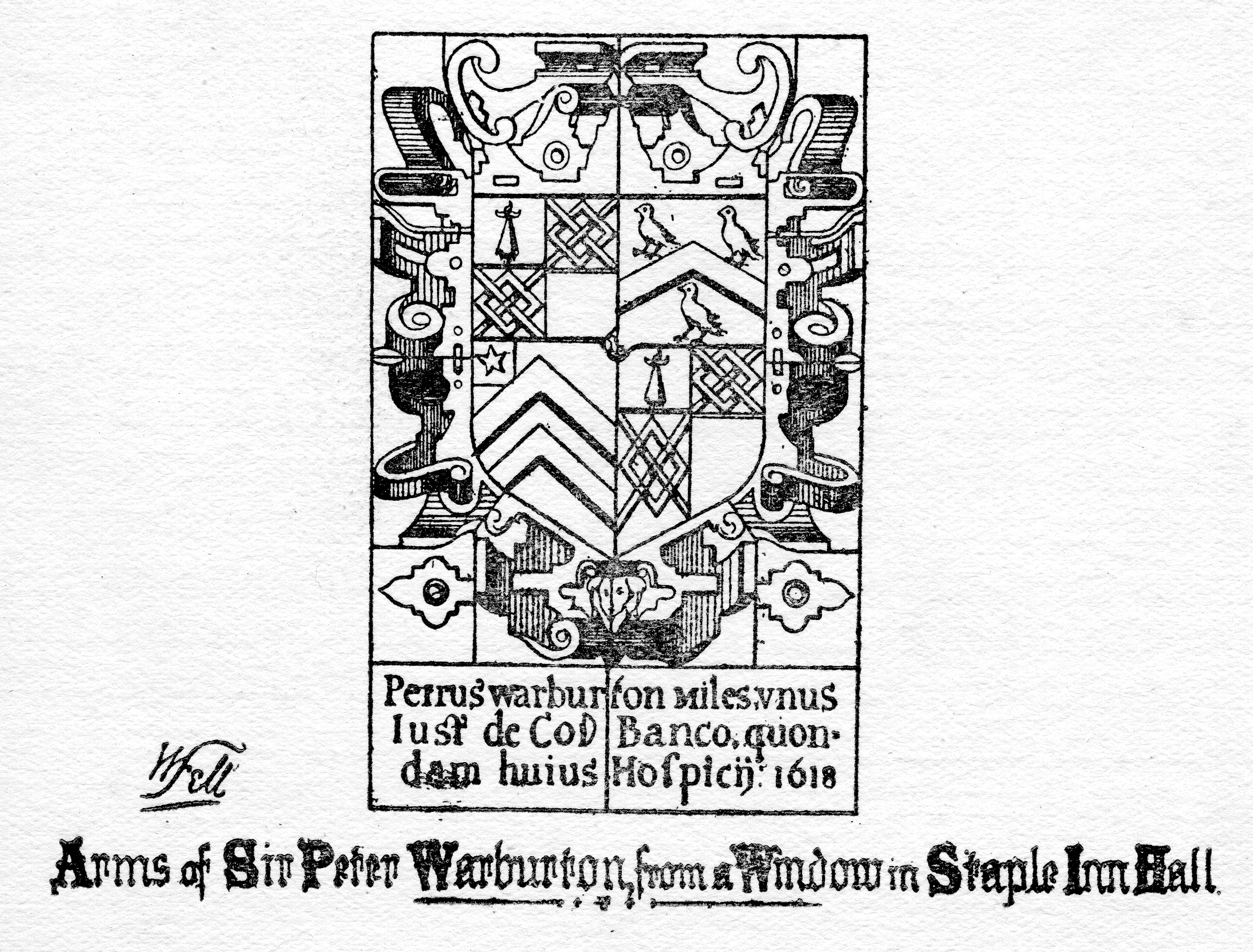 Sir Peter Warburton's arms